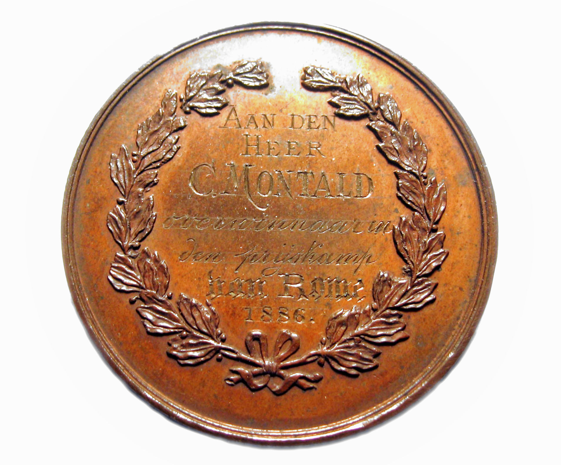 Constant Montald won de Prix de Rome (Prijs van Rome) in 1886 met zijn "Diagoras in triomf meegedragen door zijn zonen, overwinnaars van de Olympische Spelen van het Oude Griekenland". Hij ontving tevens een onderscheiding en de afgebeelde medaille van de "Maatschappij ter bevordering van Nijverheid en Wetenschappen". Deze zijde van de medaille heeft als opschrift Aan de Heer C. Montald, overwinnaar van den prijskamp van Rome, 1886".